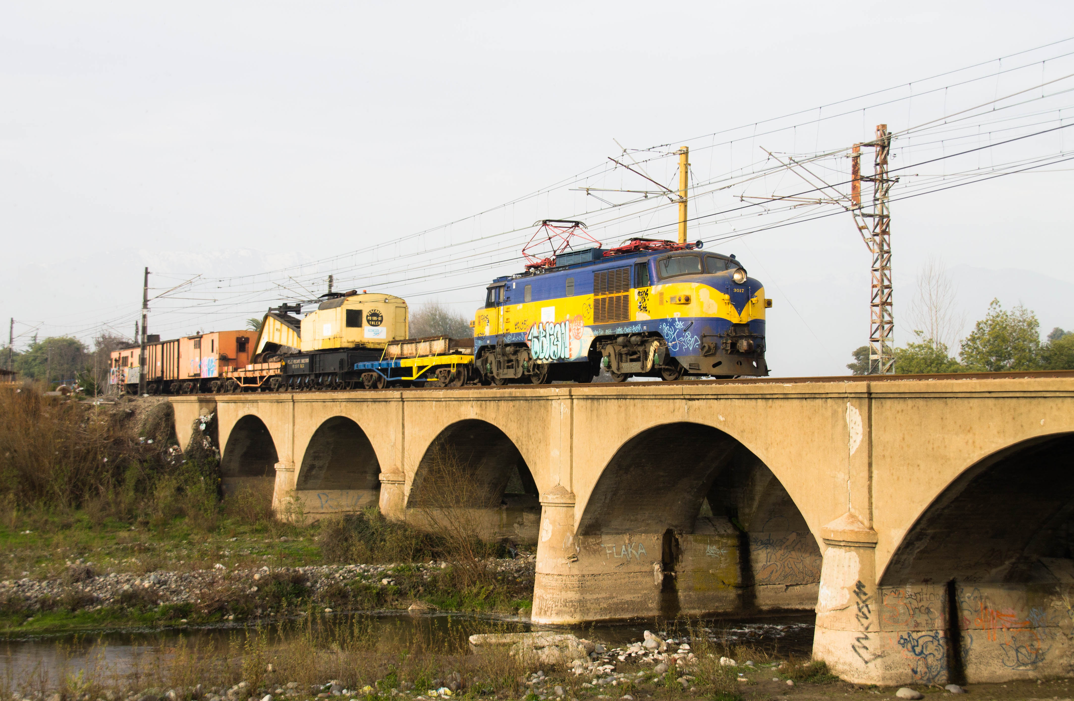 Era un dia perfecto para poder darle caza al dejado Expreso Maule, los dardos apuntaban a llegar a las extensas y solitarias rectas del Tramo Chimbarongo-Quinta, sin embargo algo hizo que todo se fuera por la borda y nos quedáramos a la espera de este otro tren, gracias al "soplo" de la buena gente de Tecdra. En la imagen, una de las que se resigna a morir, la 3017 con equipo pescante rumbo al sur. Puente Antivero, San Fernando-Chile